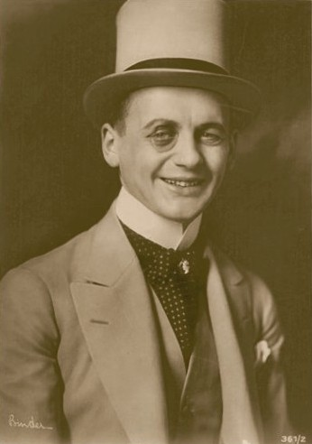 Foto des Schauspielers Reinhold Schünzel